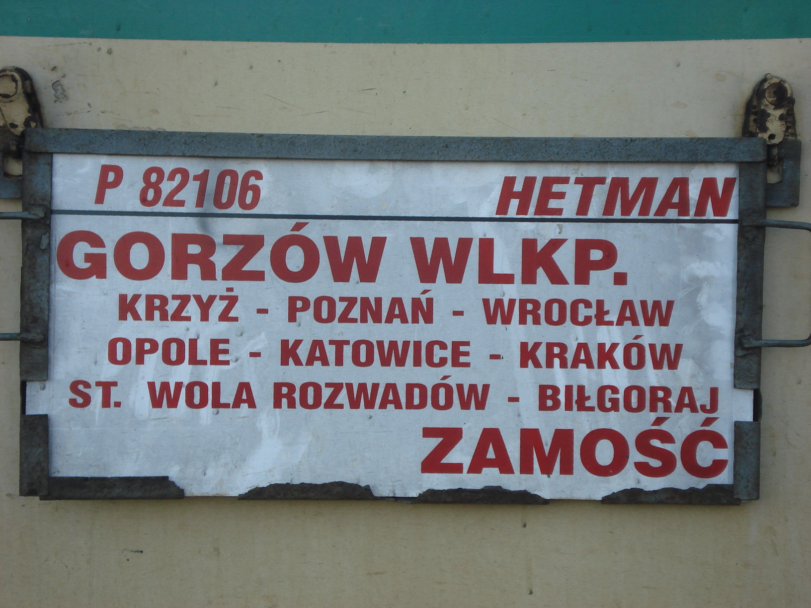 Tablica pociągu Hetman